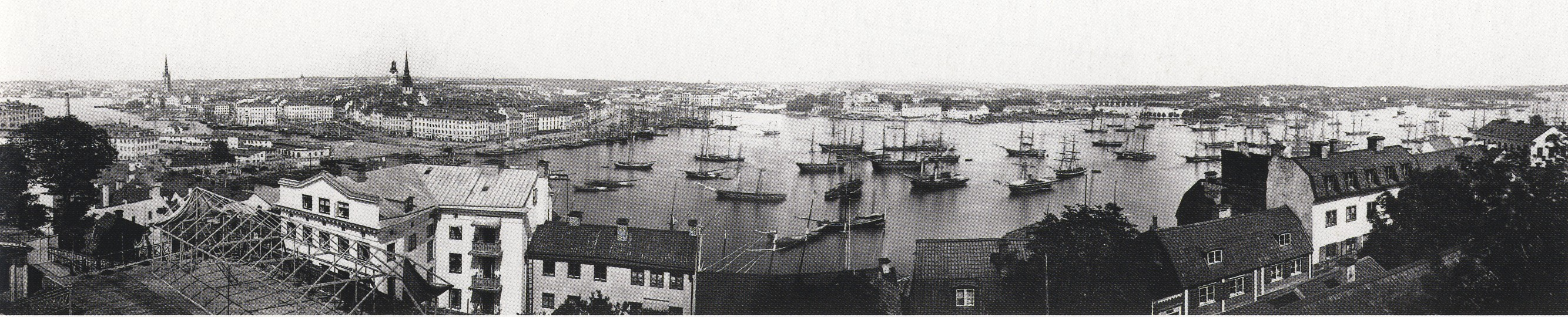 Utsikt över Stockholm från Mosebacke på Södermalm